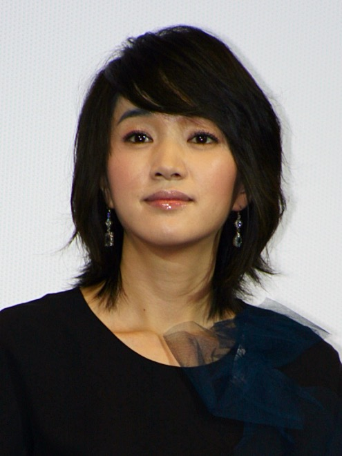 그해 여름 시사회